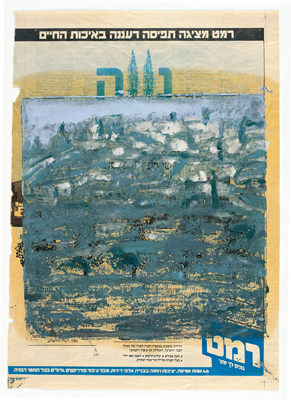 Painting